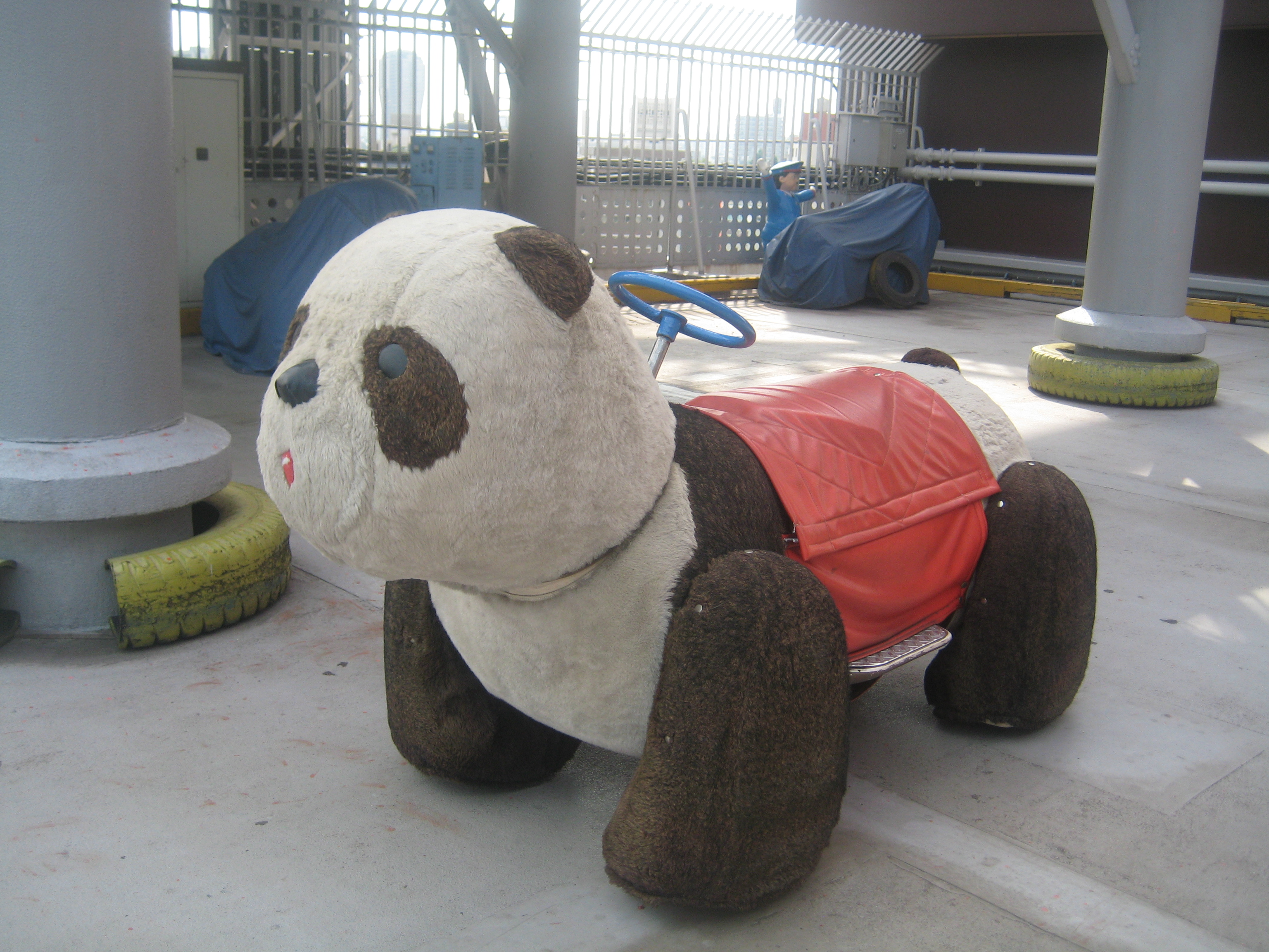 Panda car